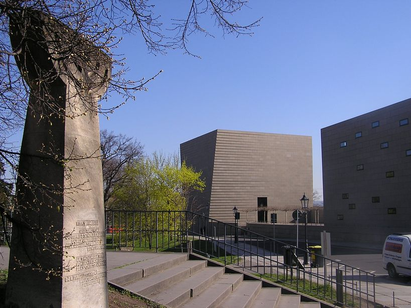 Dresden Altstadt - Synagoge Stele